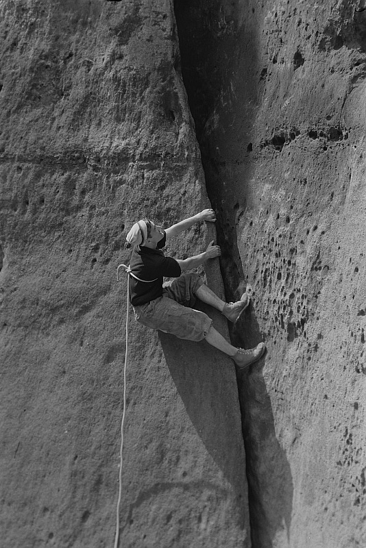 Original image description from the Deutsche FotothekIm Klettergarten Sächsische Schweiz, Hangeln am Riss